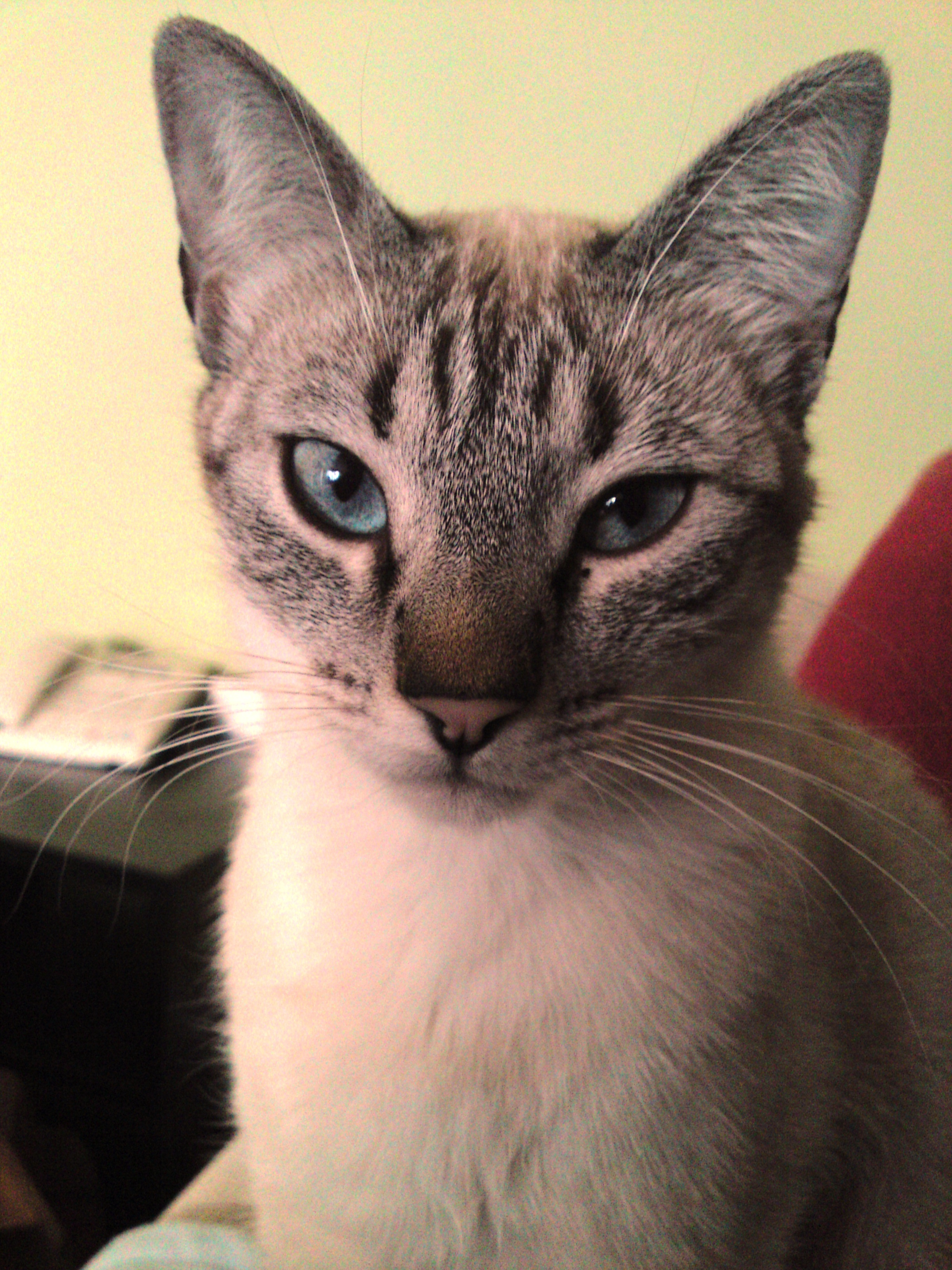 Gato Común Europeo (Hembra)